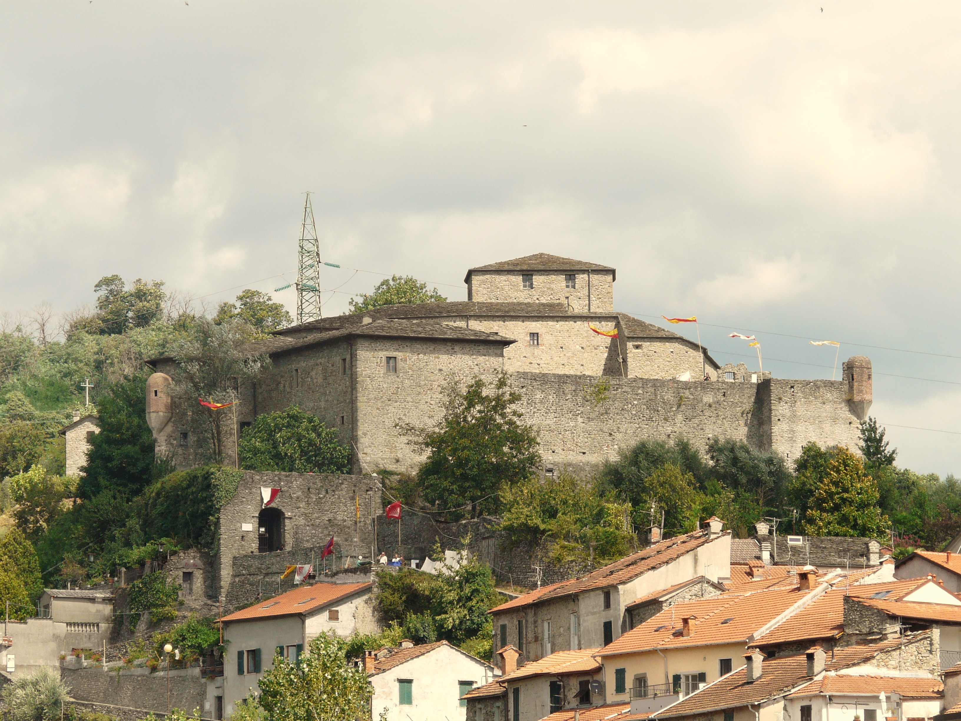 Castello del Piagnaro, Pontremoli, Toscana, Italia